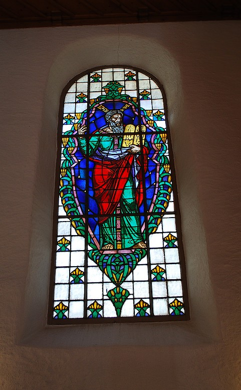 Un vitrail de Ernst Linck (1874–1935) à Meiringen (Moïse, 1915)